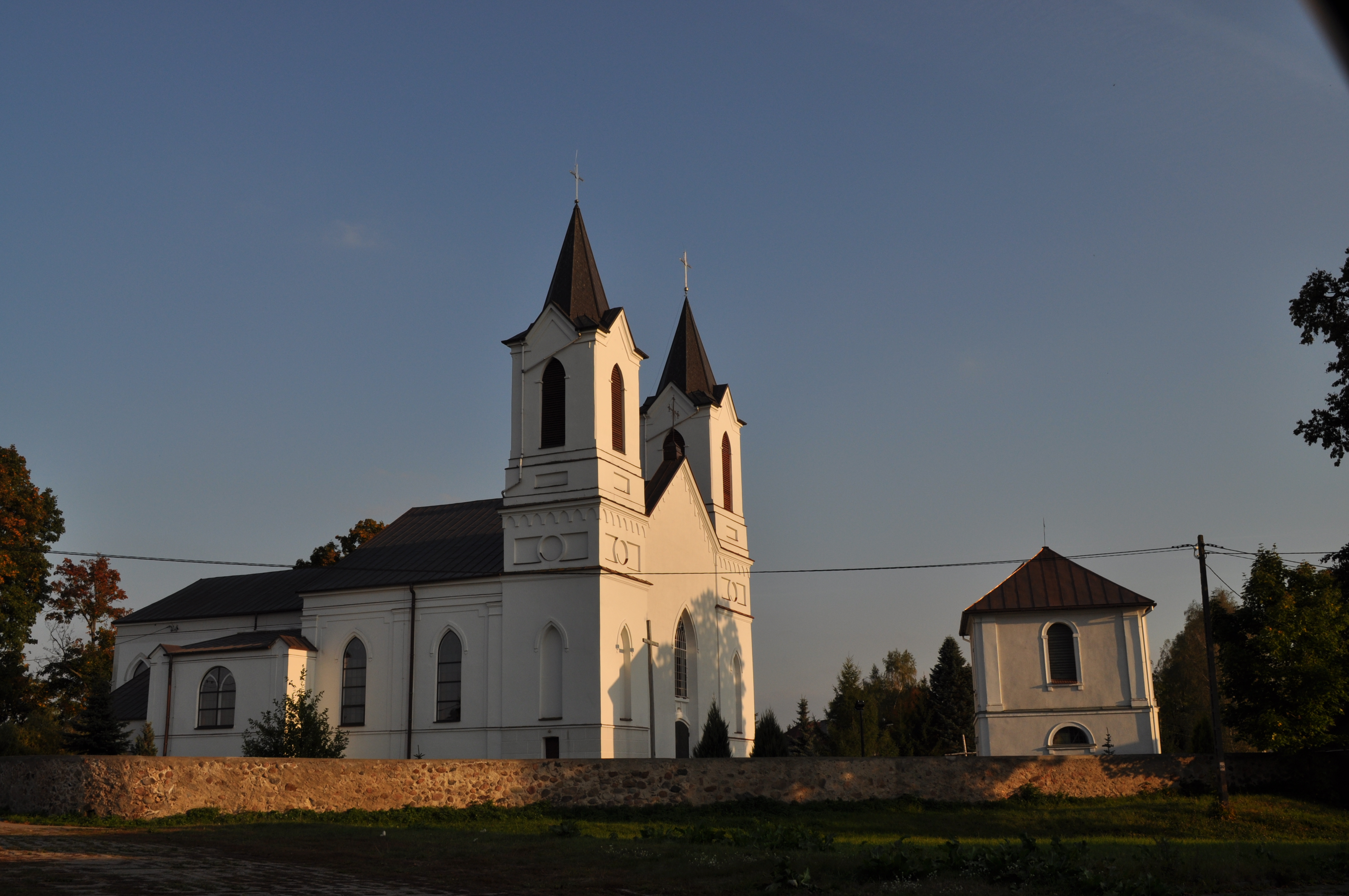 Kościół par. p.w. Jana Chrzciciela w Nowym Dworze, gmina Nowy Dwór, powiat sokólski 07.1995.